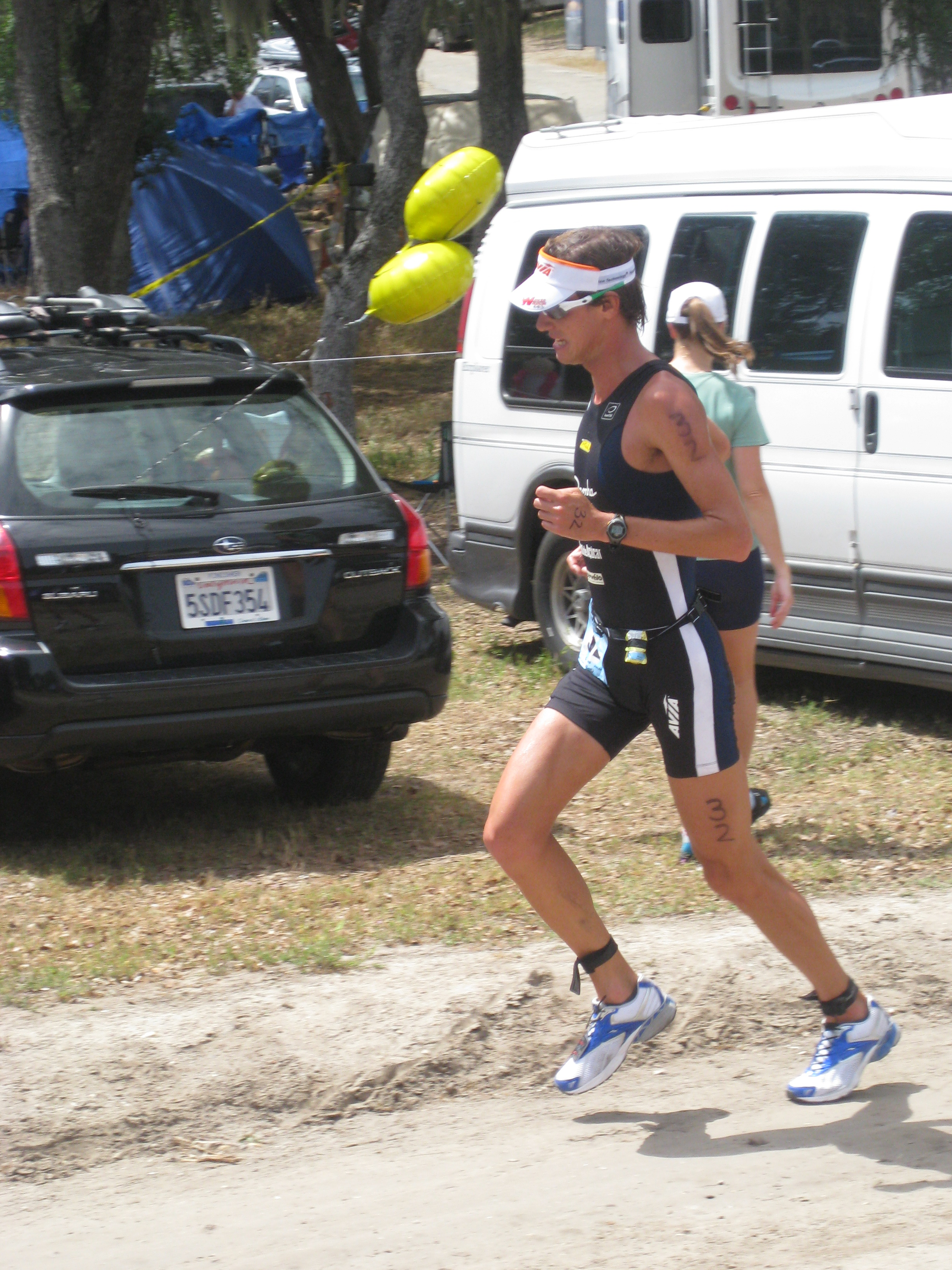 Reinaldo Colucci Triathlon Windfower 2009